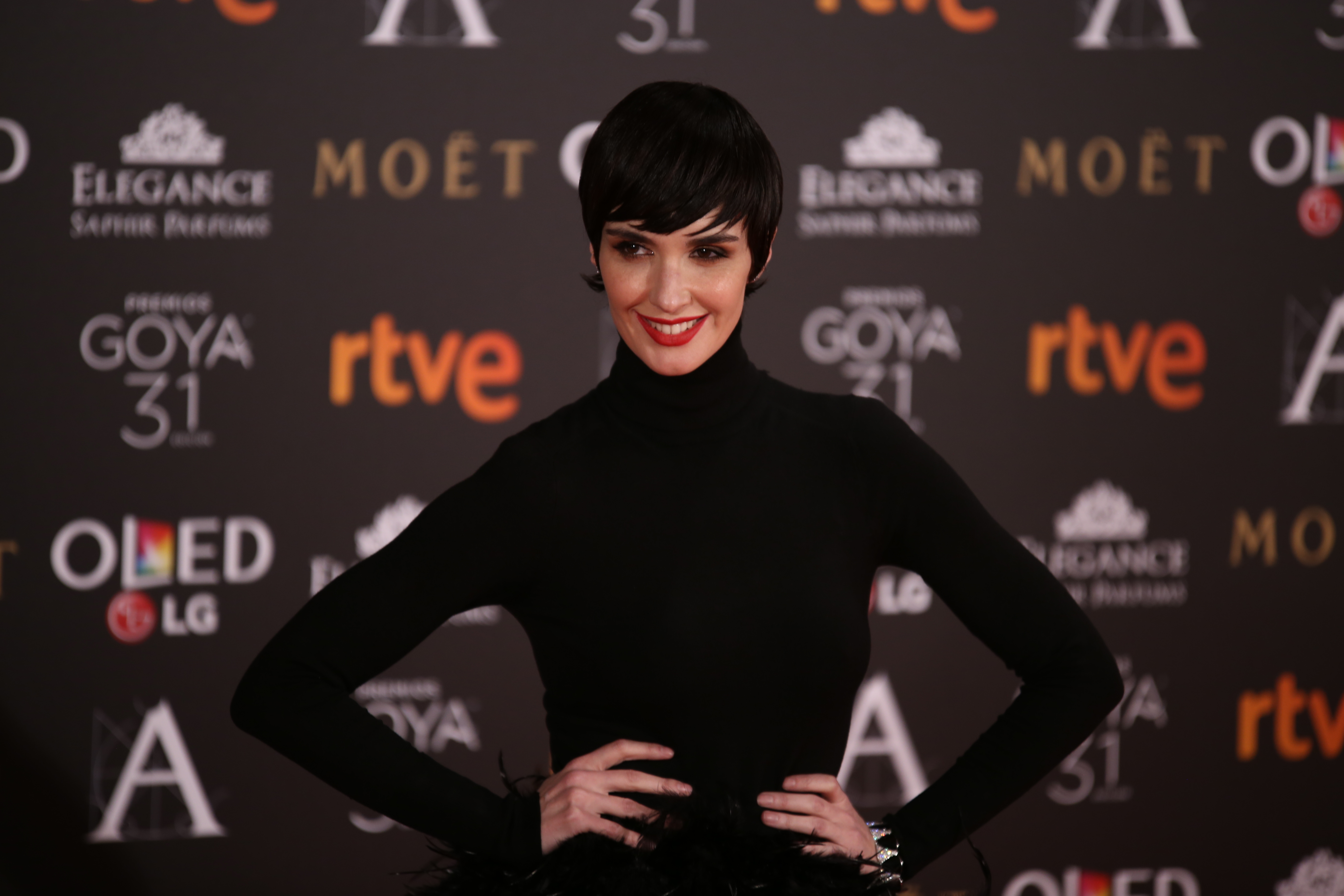 Premios Goya 2017